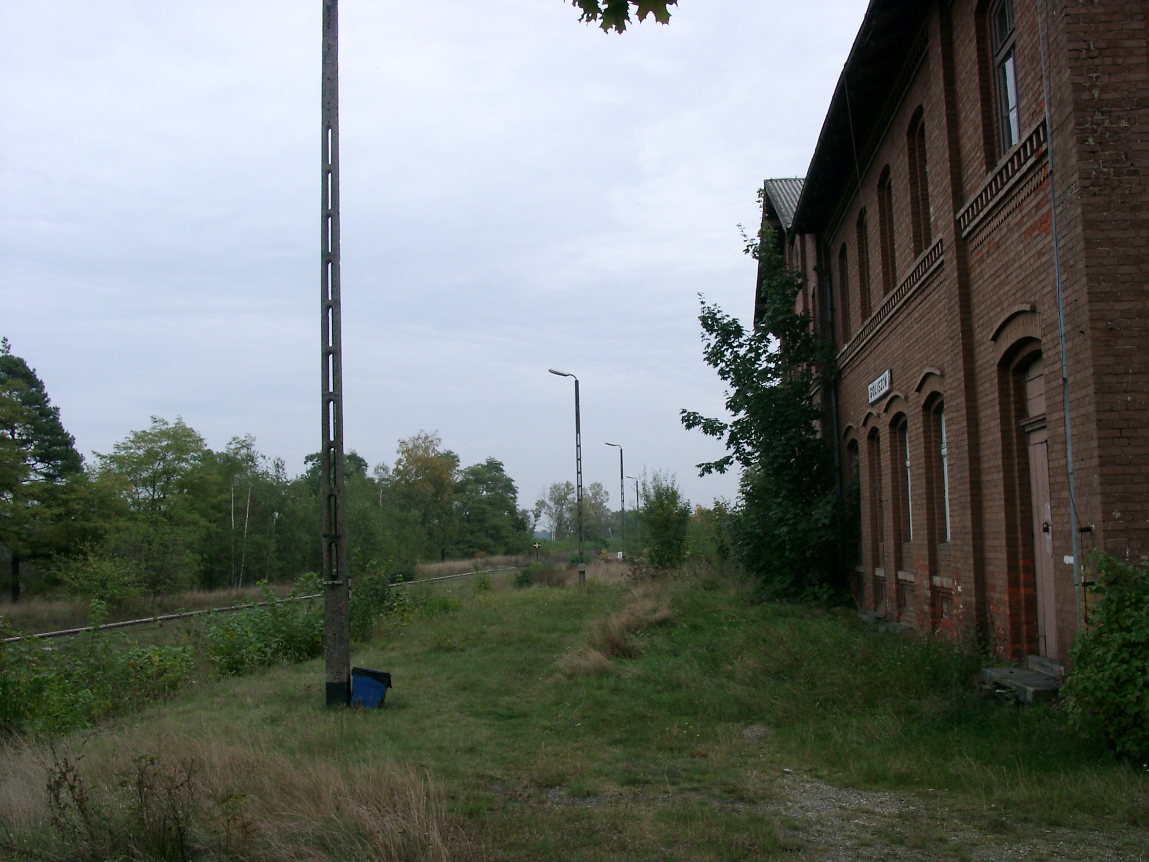 Stacja kolejowa w Goliszowie koło Chojnowa (Polska). Railway station in Goliszów near Chojnów, Poland.